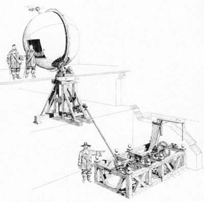 Rekonstruktion des Antriebs des Gottorfer Riesenglobus (Zeichnung: Felix Lühning).